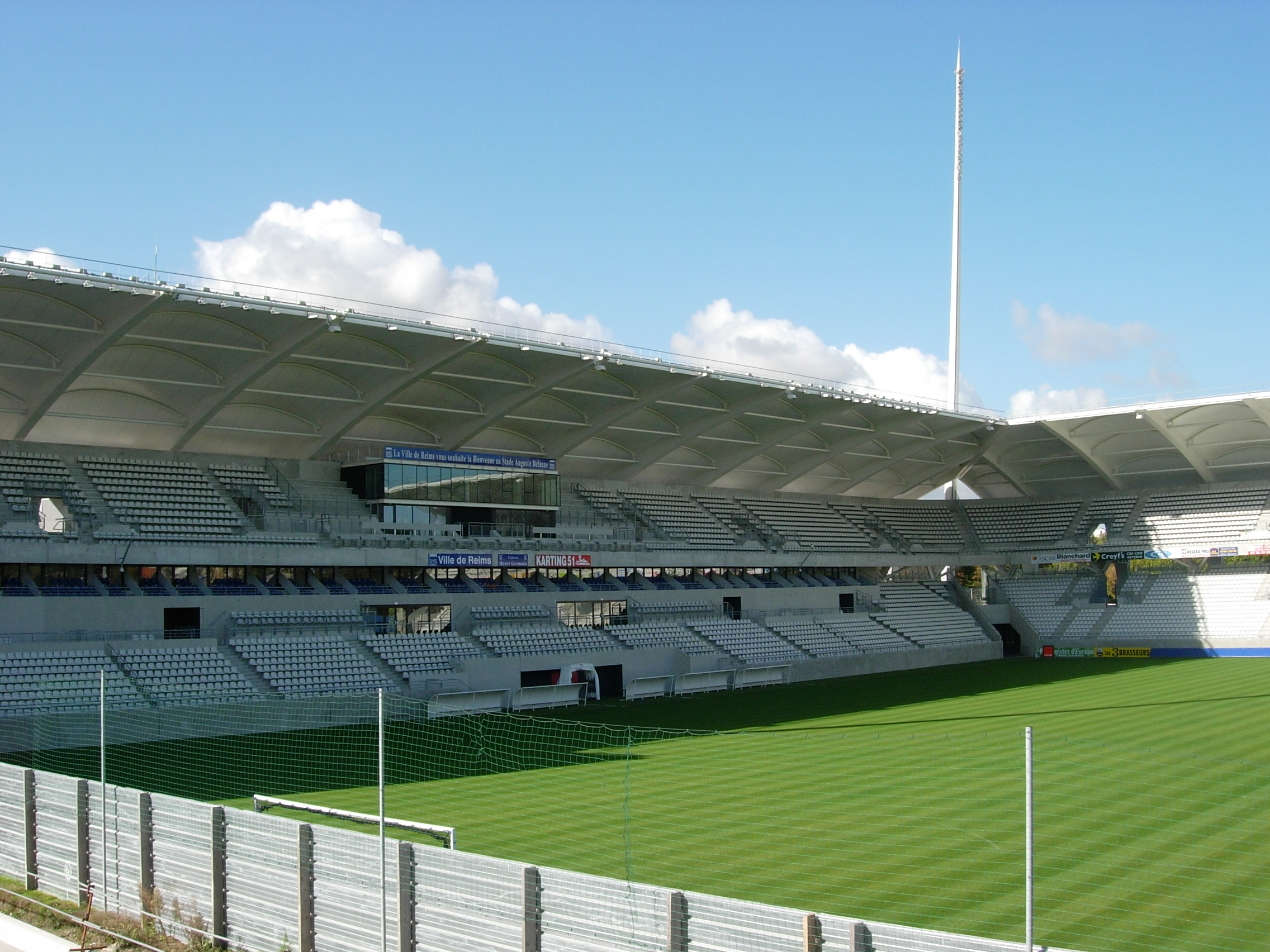 Stade Auguste-Delaune Reims, Tribunes Henri Germain und Albert Batteux